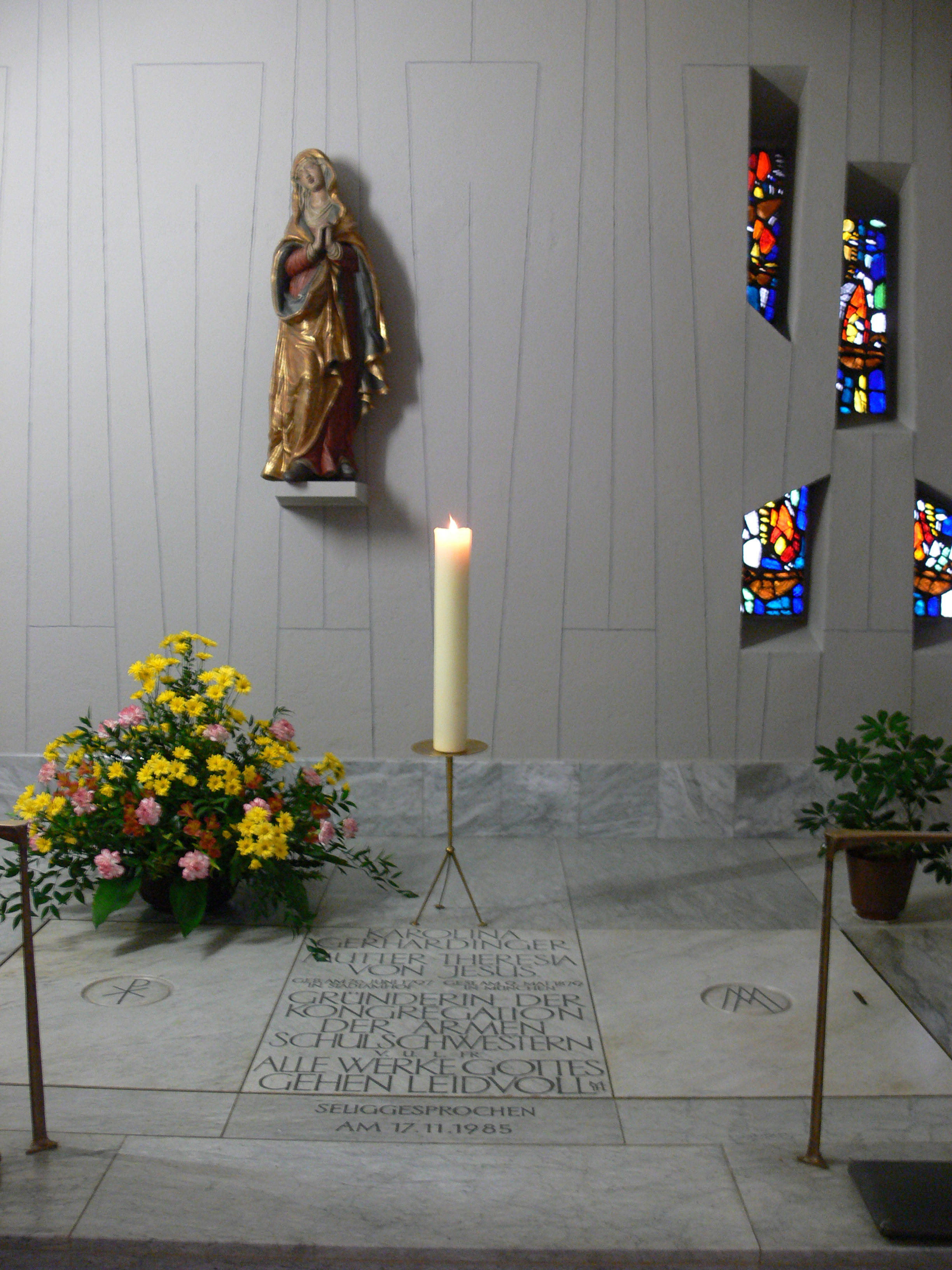 Katholische Kloster- und Institutskirche St. Jakob am Anger, Unterer Anger/St.-Jakobs-Platz, München, Grabmal Karolina (Theresia) Gerhardingers.